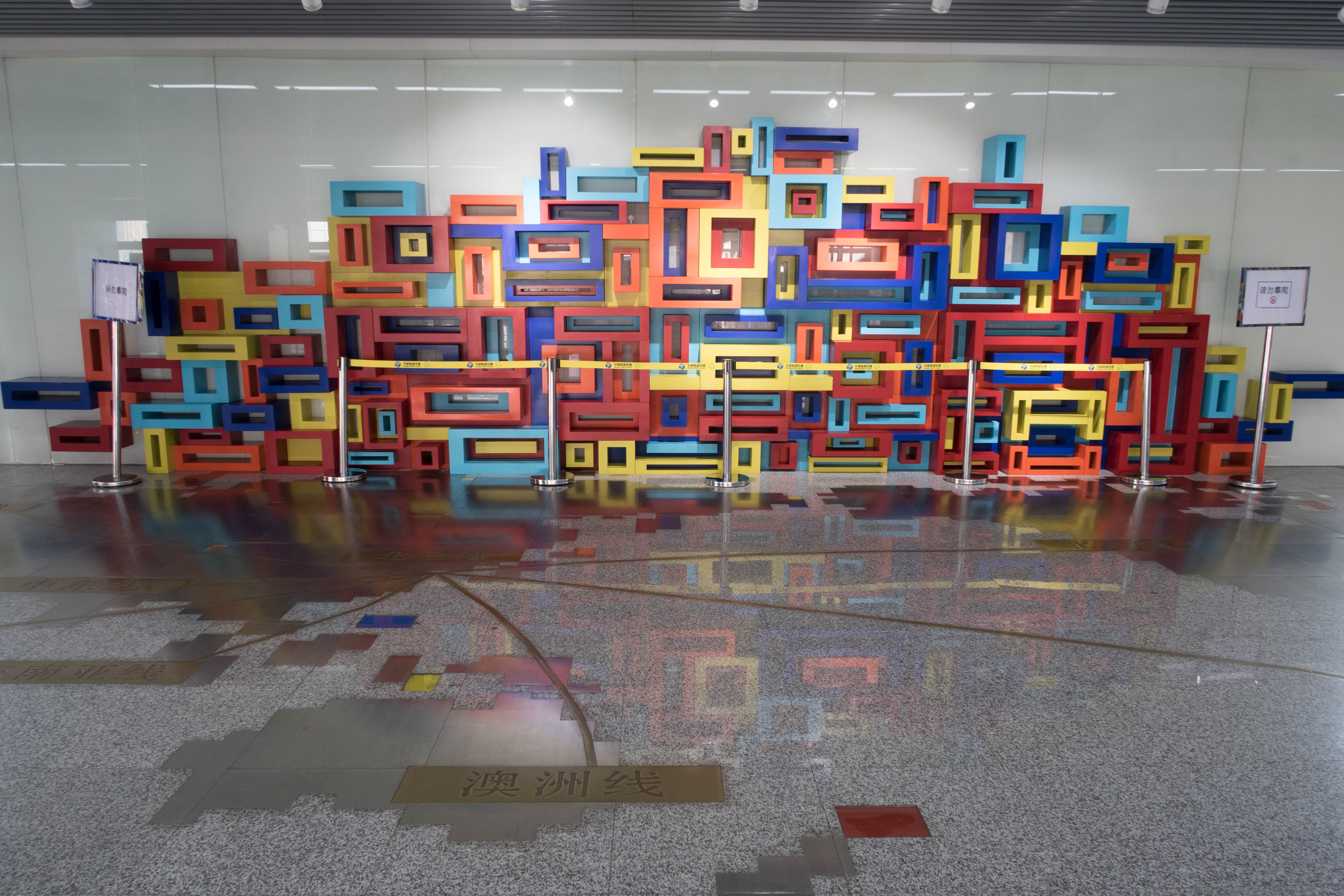 长江路站艺术墙《港通天下》